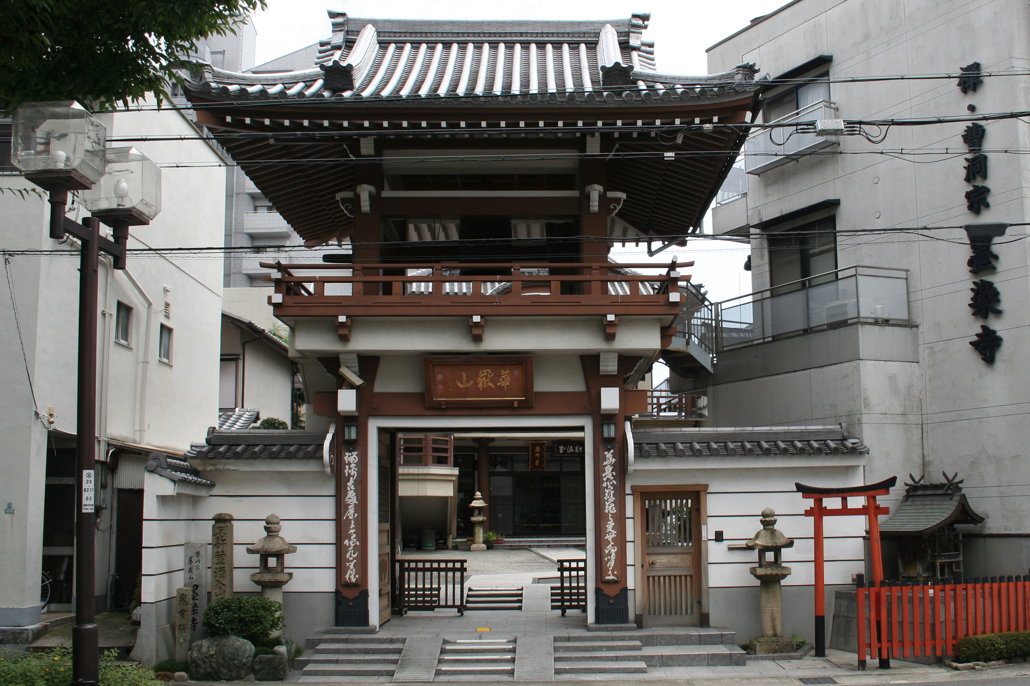 =墨染寺（兵庫県伊丹市） 山門